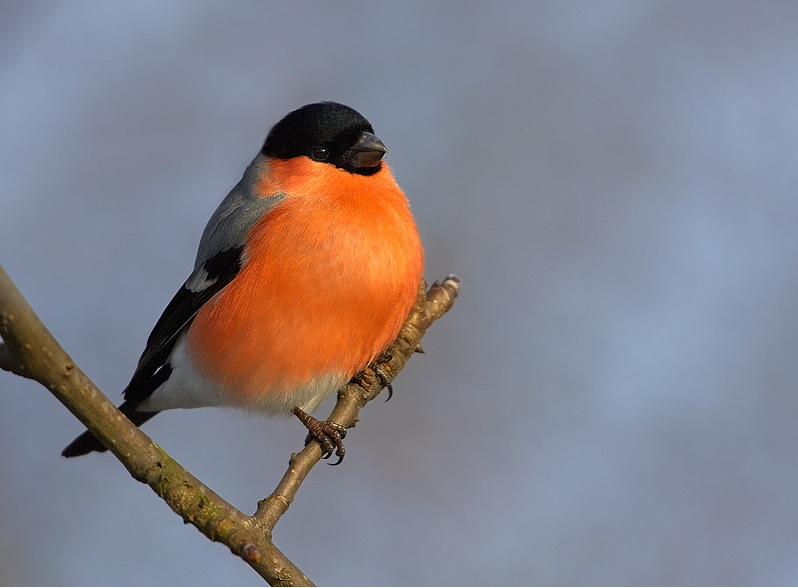 Pyrrhula pyrrhula - male; Konicko, CZ